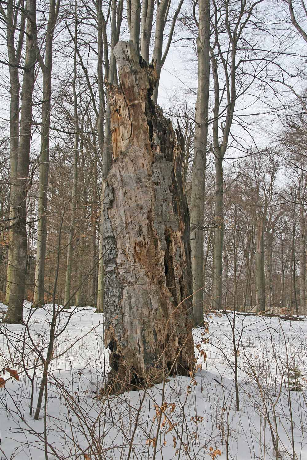 Buky v Přírodní rezervaci Buky u Vysokého Chvojna